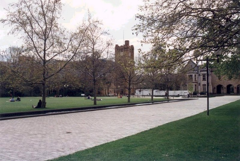 Entrée de l'université de Melbourne, Victotia, Australie